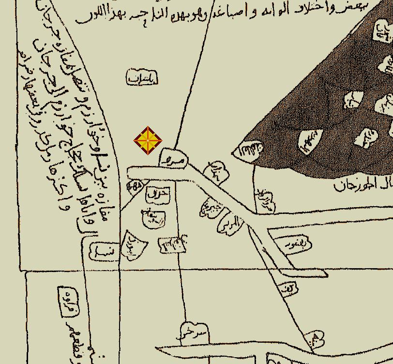 بریده‌ای از نقشه «خراسان» مندرج در کتاب «صورة‌ الارض» تالیف این حوقل (درگذشته در سال‌های پس از ۳۶۷ هجری)؛ ترسیم شده در قرن چهارم هجری؛ در این بریده نقاط مهم خراسان شمالی آمده است که دربرگیرنده ربع مرو می‌باشد